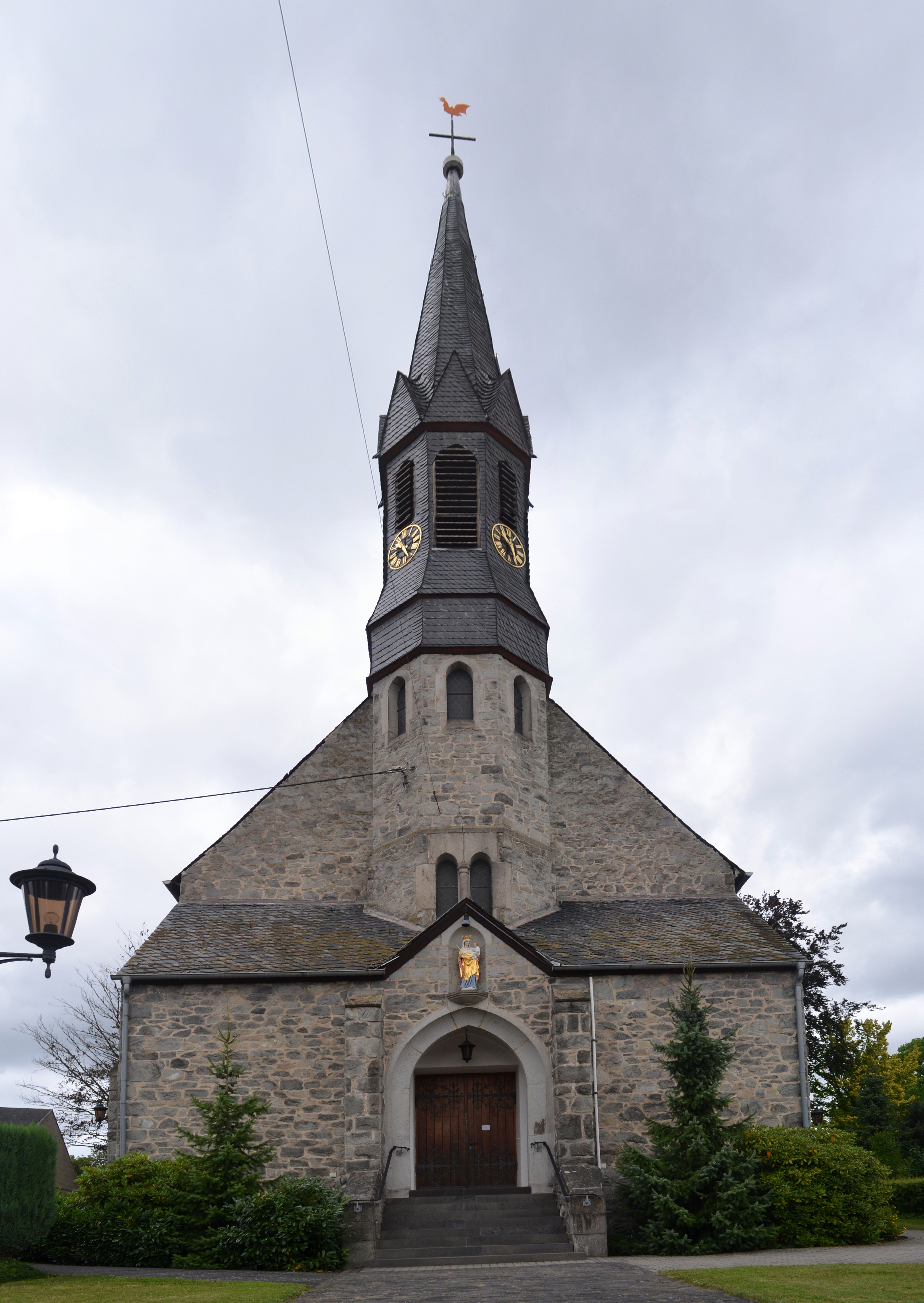 Boden (Westerwald), Kirche